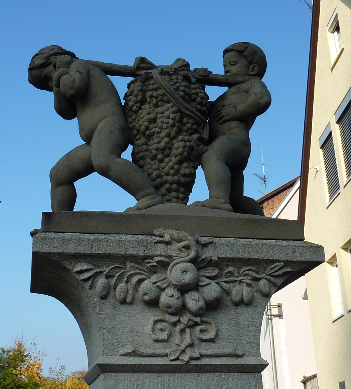 Josua-und-Kaleb-Brunnen